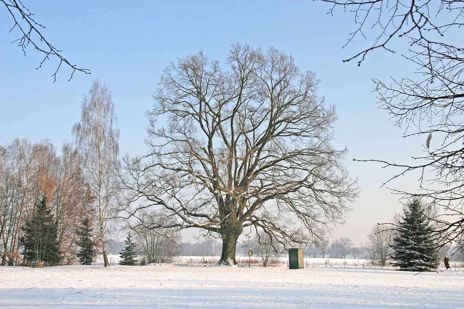 Památný dub za bývalým koupalištěm v Přelouči v zimě.